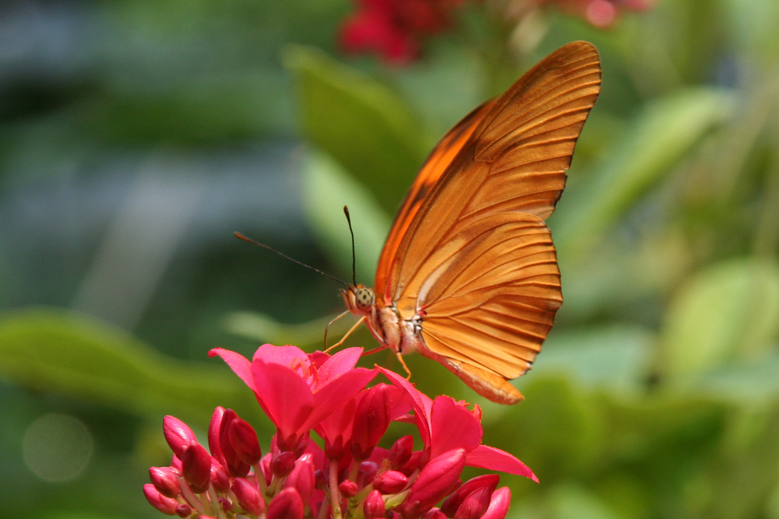 Dryas julia